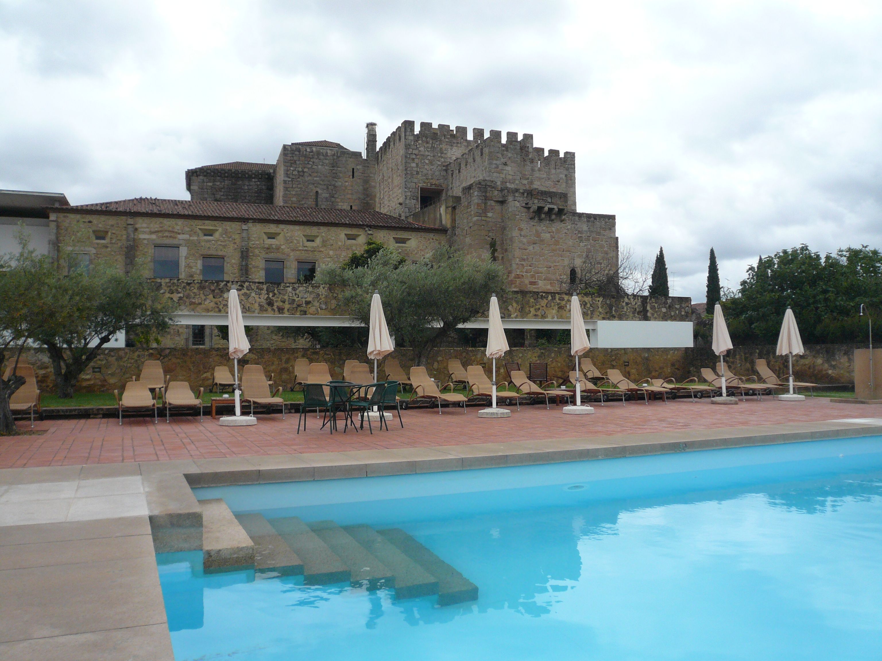 Pousada Flor da Rosa, Crato, Portugal This file was uploaded for Wiki Loves Monuments in Portugal with the unique identifier 69839.